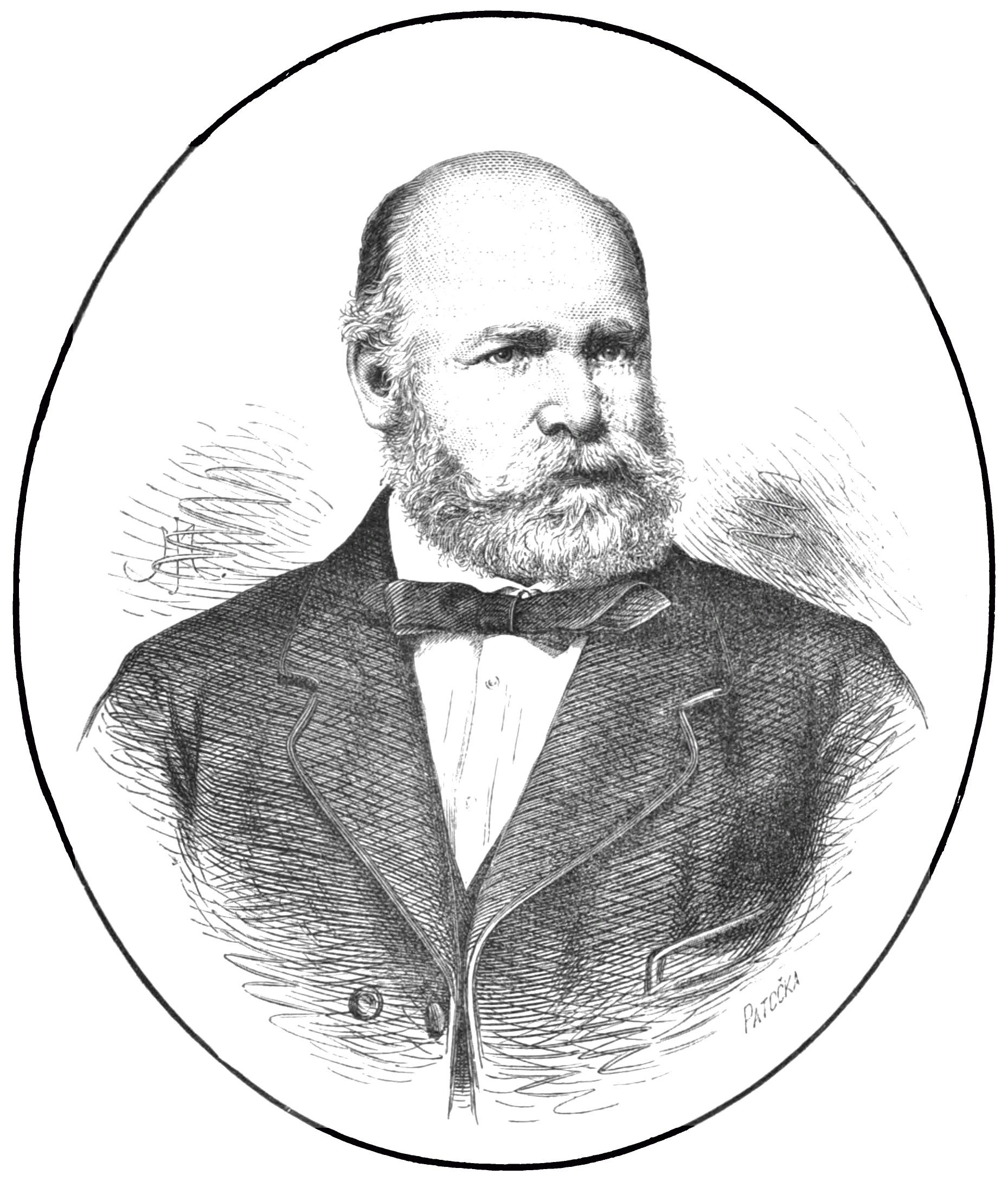 Alois Pražák (1820-1901), österreichischer Justizminister